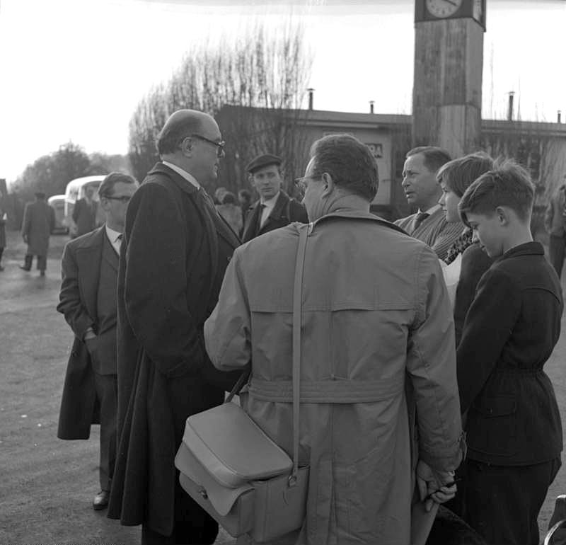 Lager Friedland Ankunft der Wissenschaftler aus Sochumi brit. Journalist Sefton DELMER im Gespräch mit den Wissenschaftlern und deren Angehörigen, 12. Februar - 16. Februar 1958